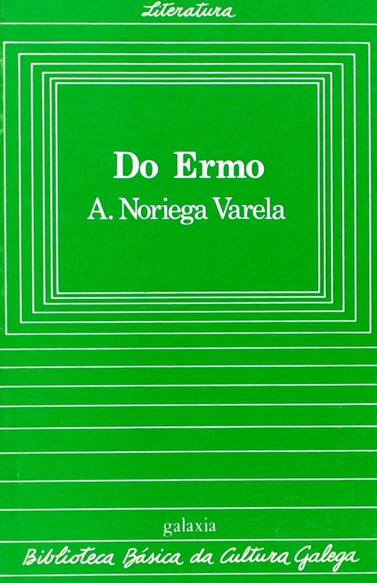 Biblioteca Básica da Cultura Galega, 34, Do ermo, A. Noriega Varela